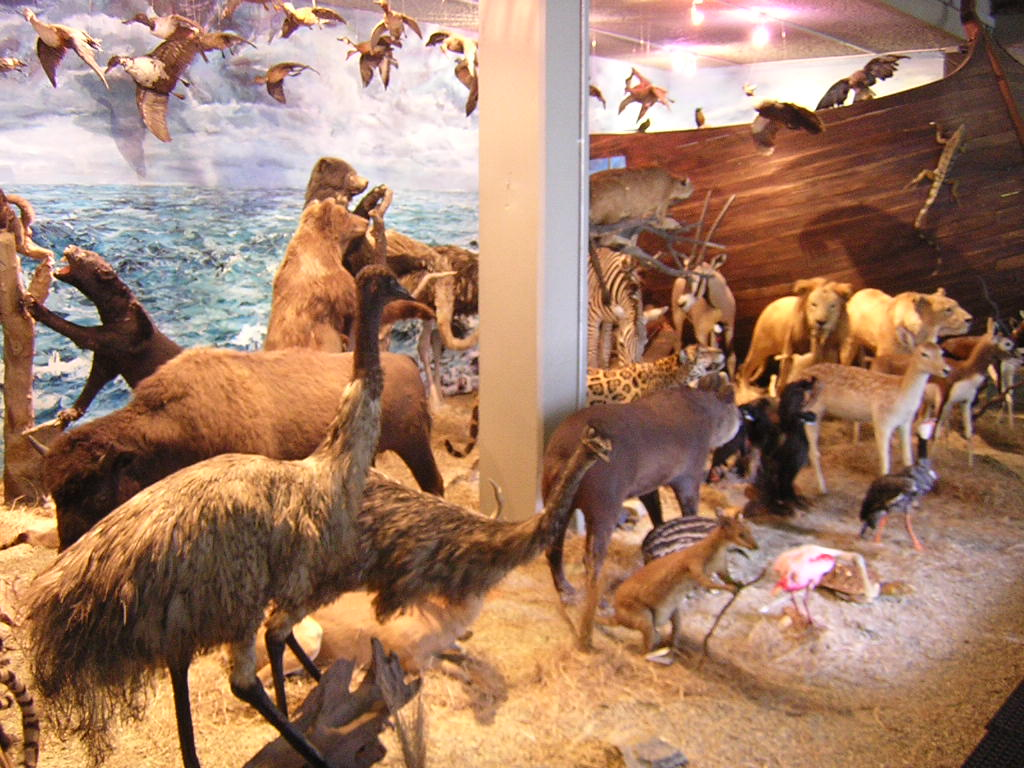 Museo Universitario Universidad de Antioquia. Medellín, Colombia